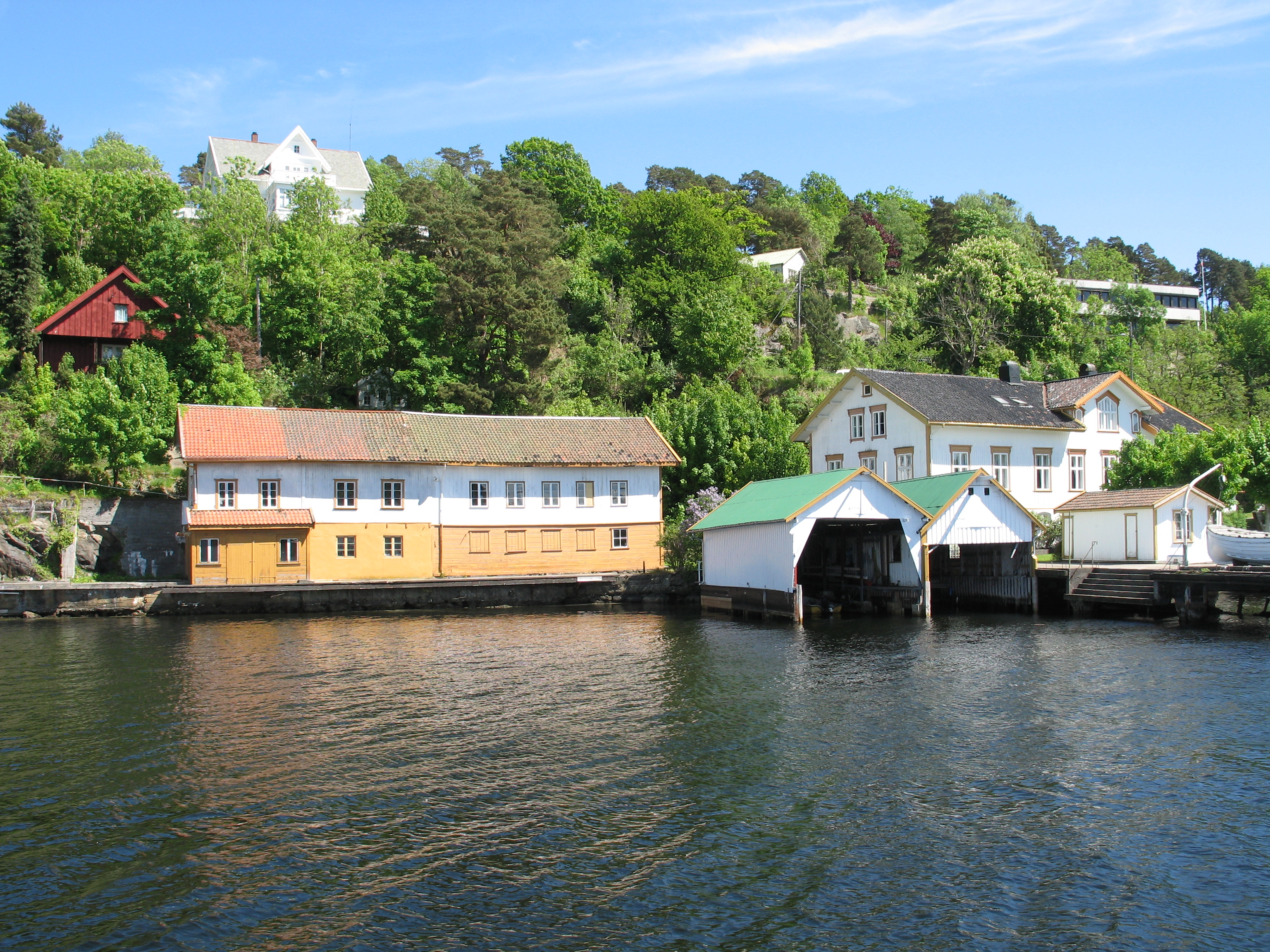 Bratteklev i Arendal